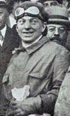 Ernest Friderich vainqueur de la Coupe des Voiturettes du Mans en 1920 - La Vie au Grand Air, 20 septembre 1920, p.42